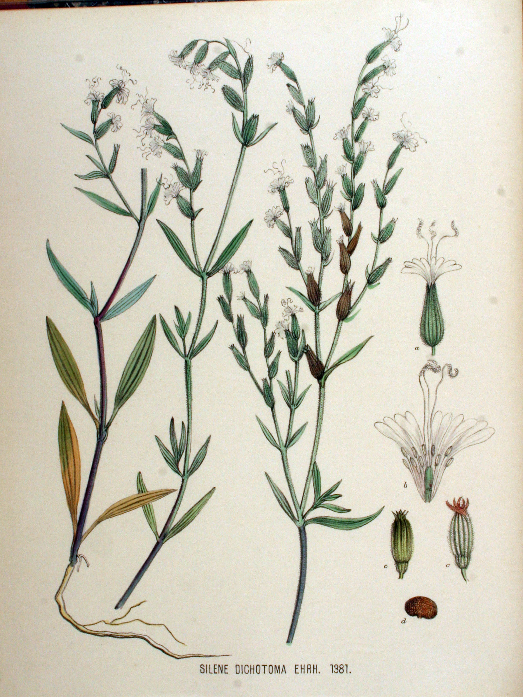 Silene dichotoma Ehrh.